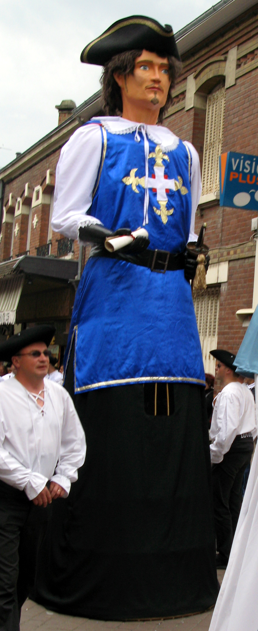 Ham (Somme, France) - Animation festive au centre-ville, un dimanche de printemps. Le géant Thomas le Mousquetaire. .